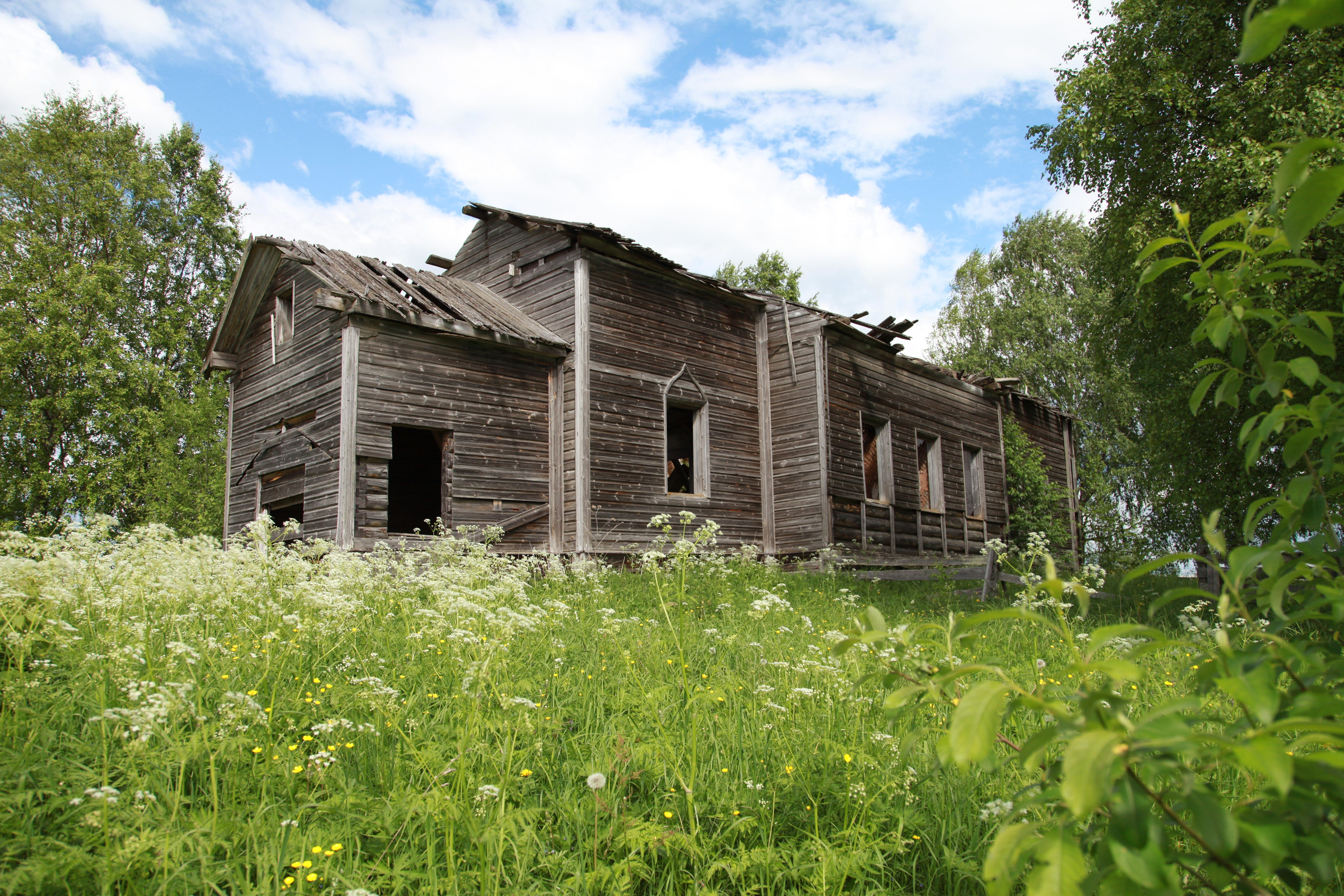 Церковь: Леменьга (Липовская с/а), Вельский район, Архангельская область